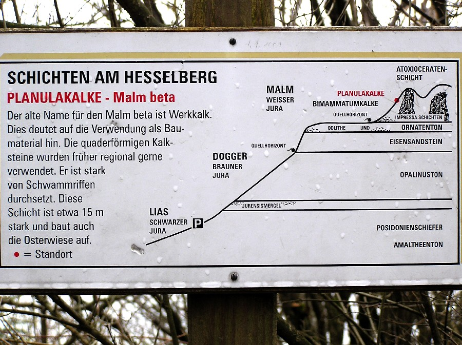 Informationstafel am Geologischen Lehr- und Wanderpfad auf dem Hesselberg Fotograf: Oswald Engelhardt